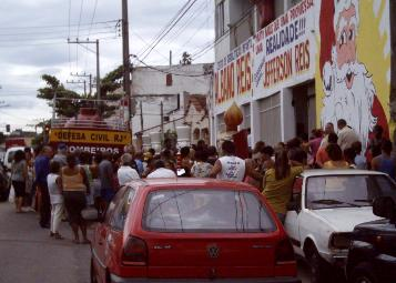 velório do deputado estadual Albano Reis